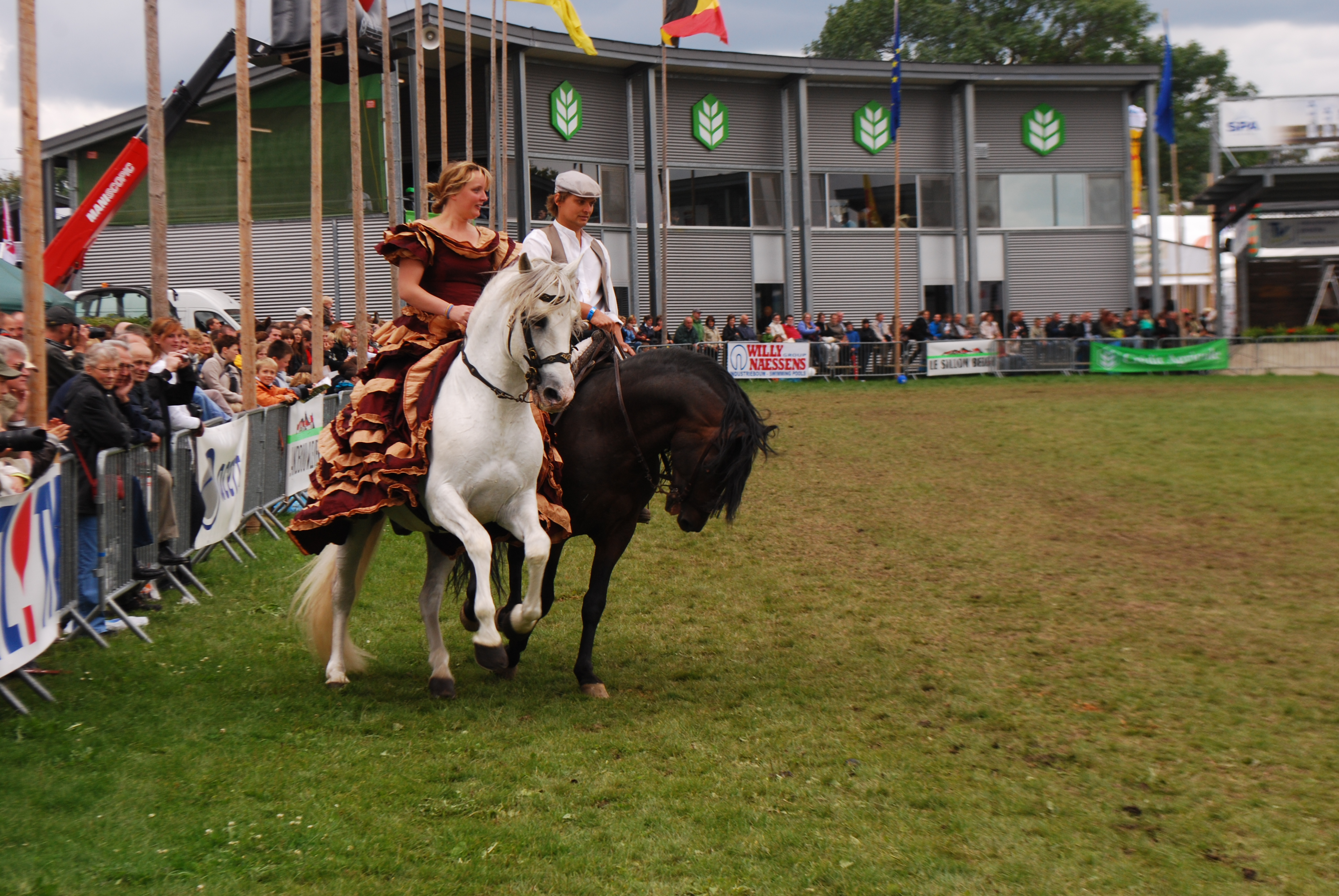 Vue de la foire agricole de Libramont, le dimanche 24 juillet 2011.